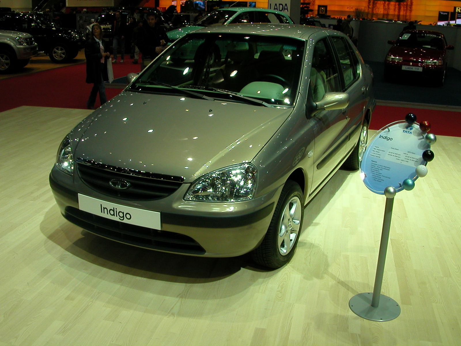 Tata Indigo in Genewa 2005